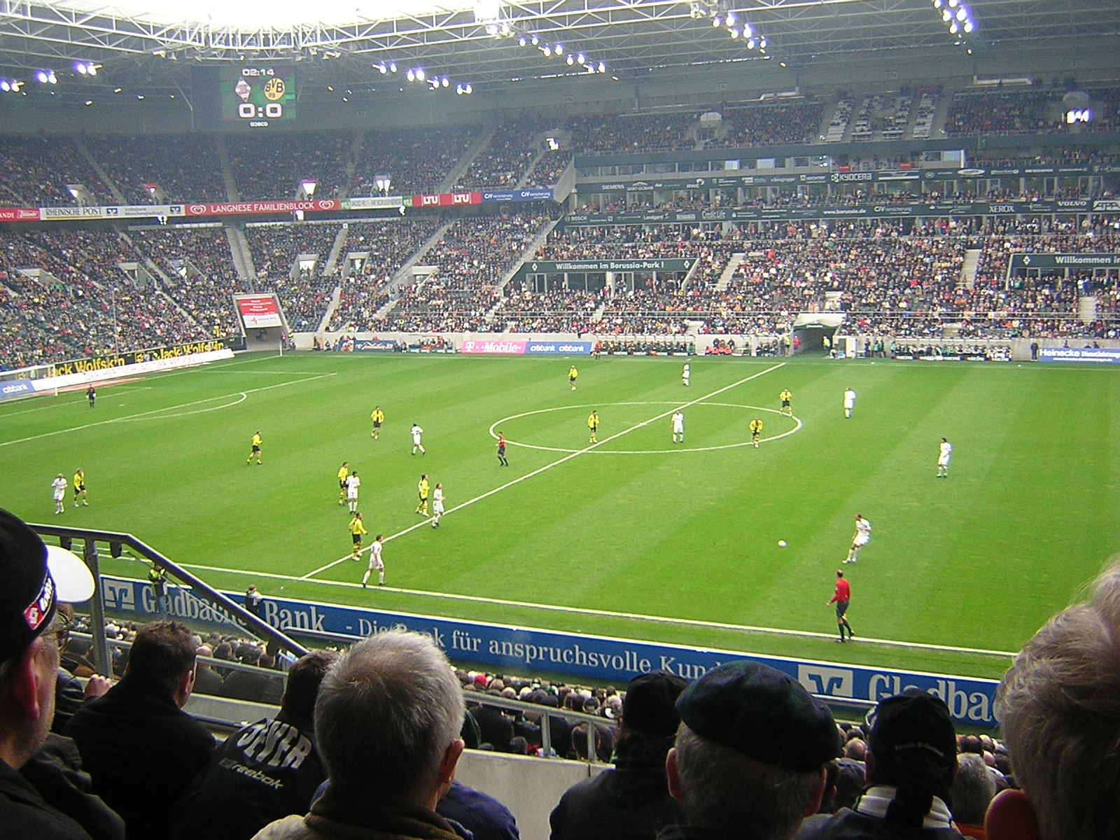 Der Borussiapark beim Spiel zwischen Borussia Mönchengladbach und Borussia Dortmund